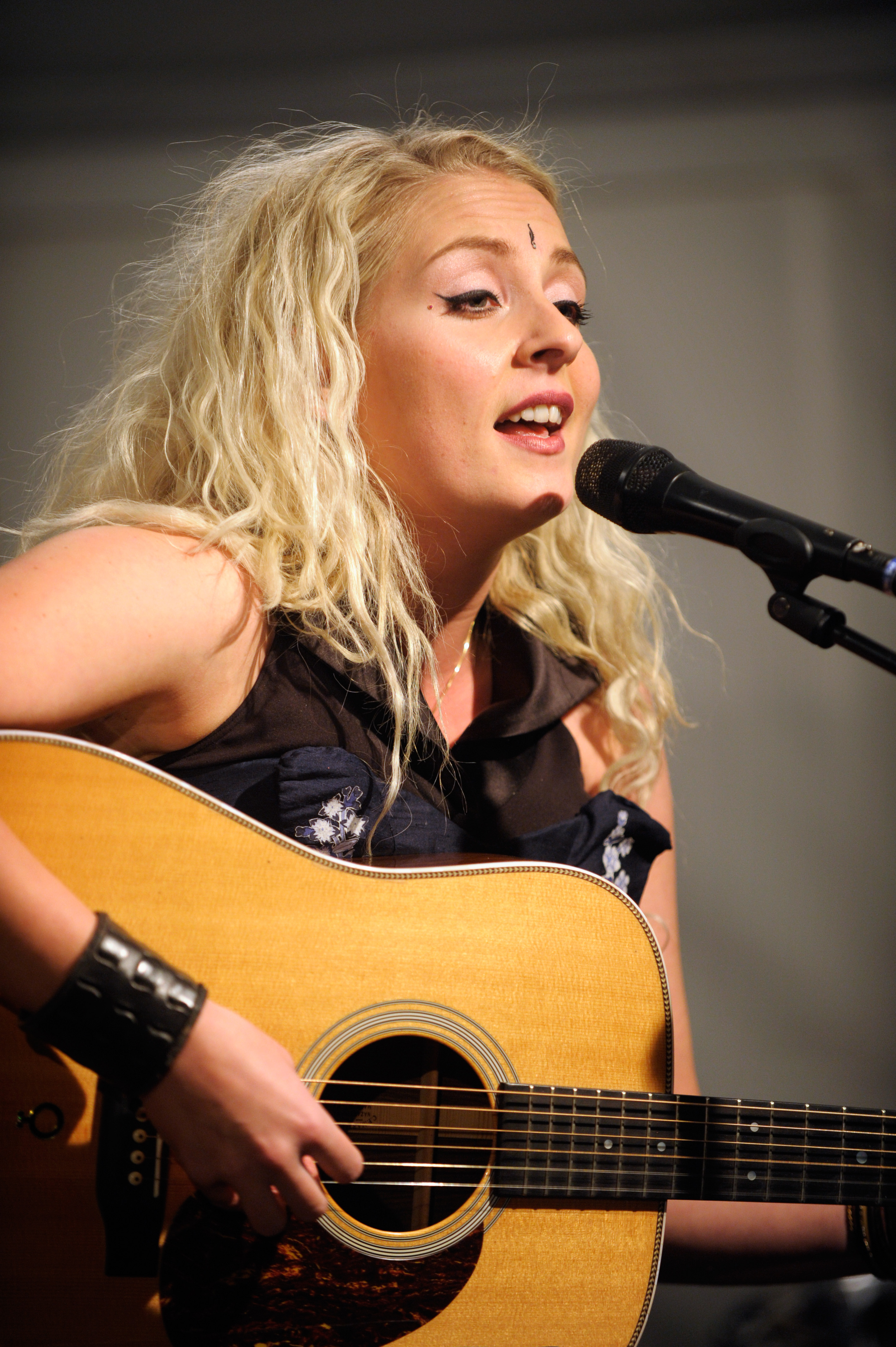 Eivør Pálsdóttir sjunger på kulturnatten 2008-10-10